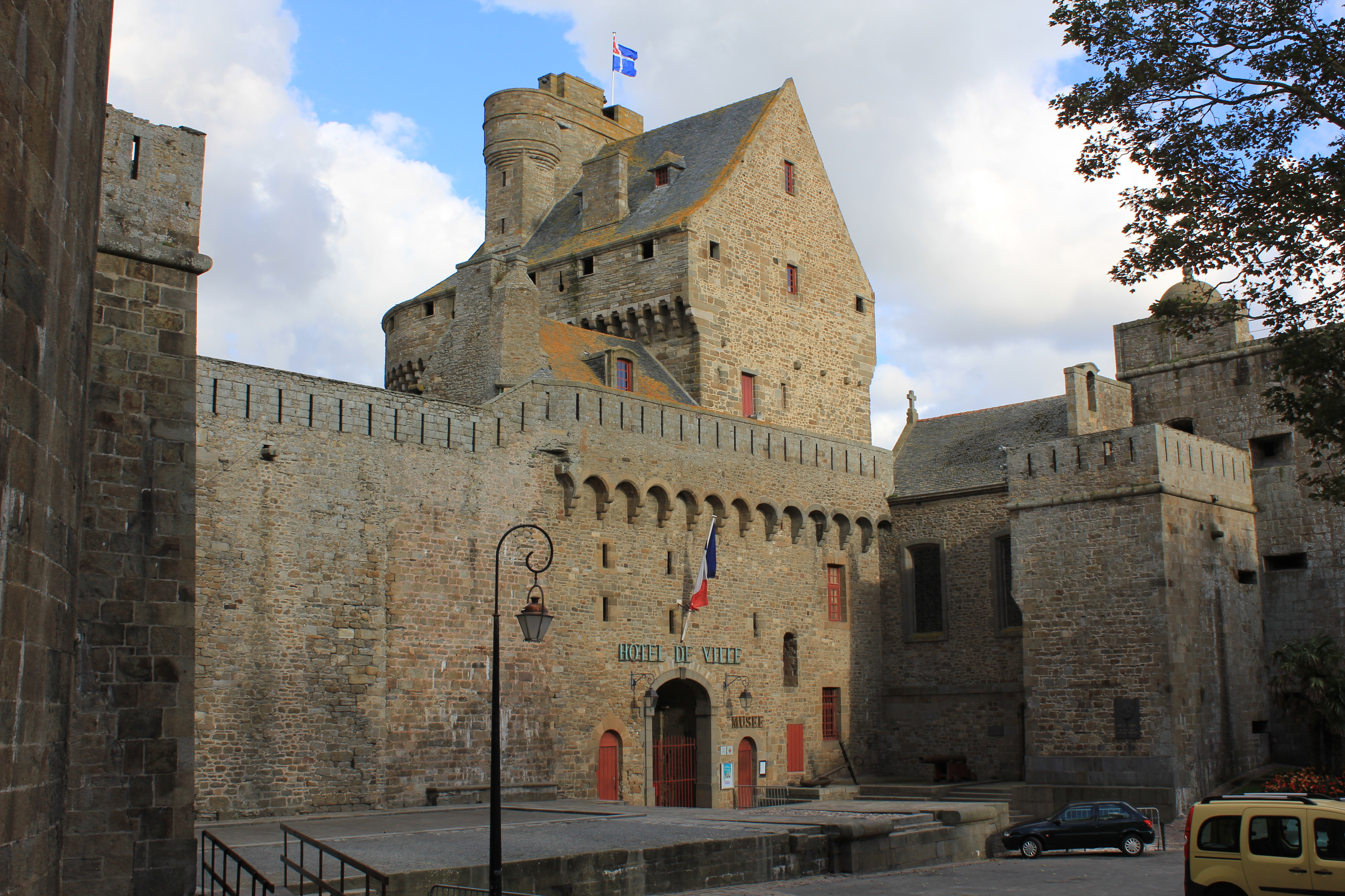 Hôtel de ville de Saint-Malo situé dans le château de la duchesse Anne